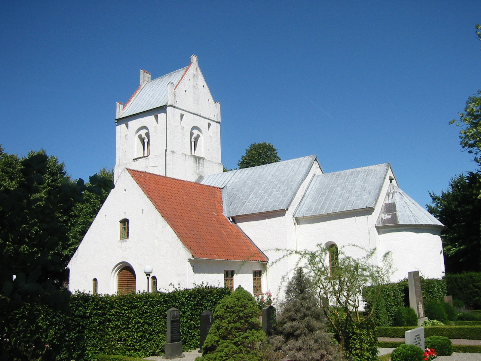 Fjelie kyrka.